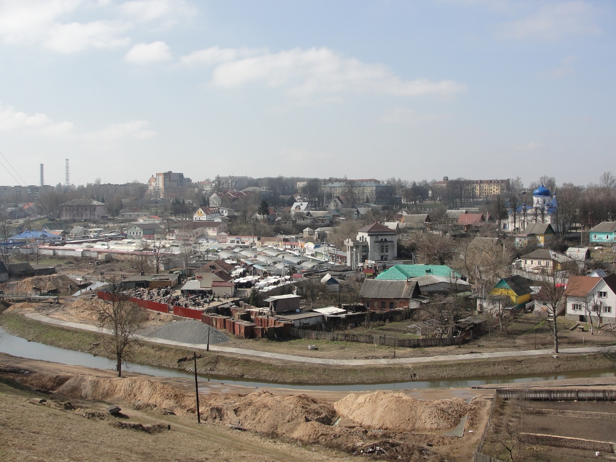 Быховский рынок